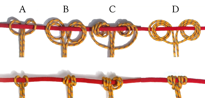 Aufbau des Prusikknoten und Variante a+b. A= Ankerstich, B= doppelter Ankerstich » Prusik (normal) C= Ankerstick dreifach » Prusik doppelt außengeschlagen D= Prusik doppelt innengeschlagen